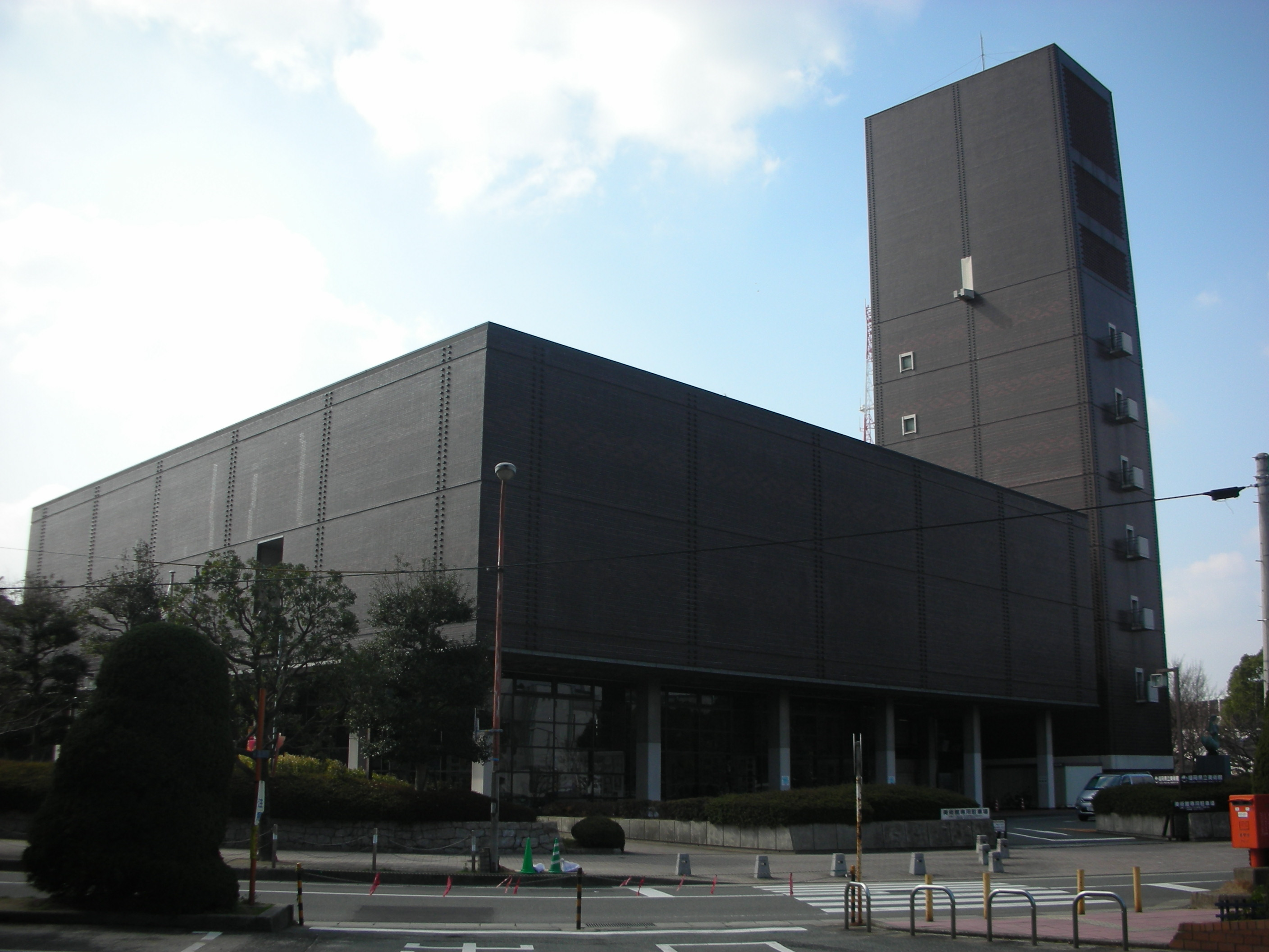 2009/2/10におんさき自身が撮影。福岡県立美術館。